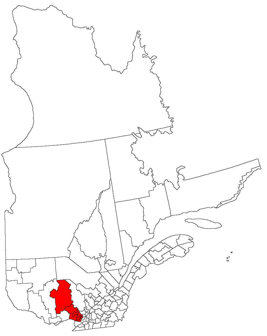 Laurentides region, Quebec